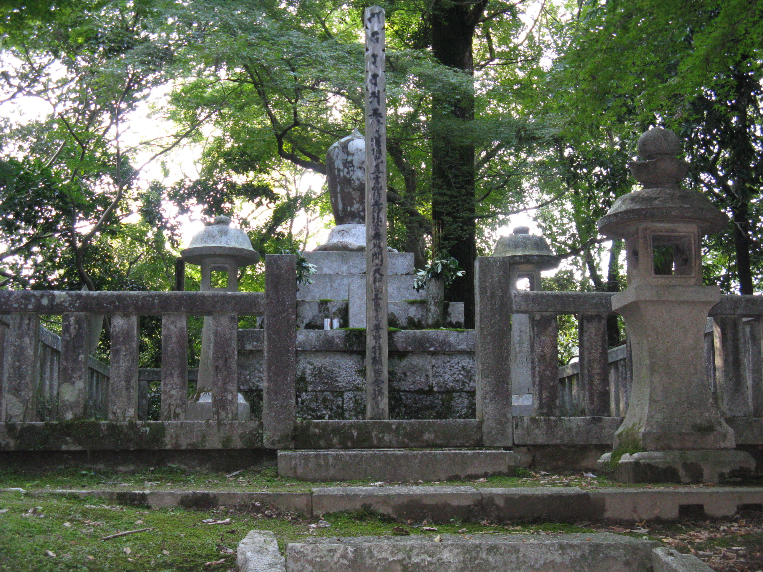 延命寺の中興の祖、浄厳の墓地